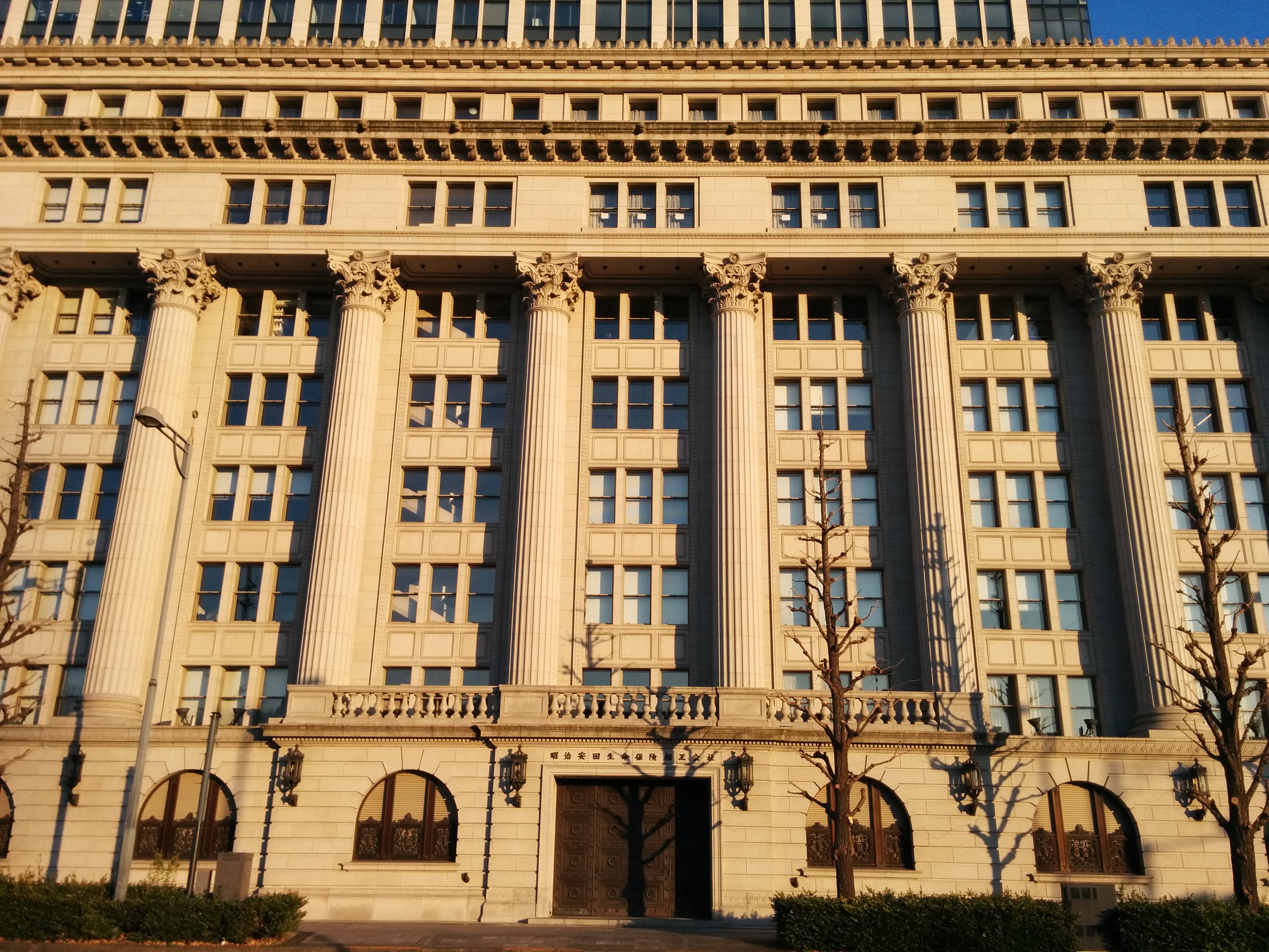 Front